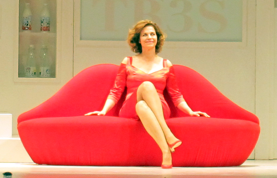 Teatro Giuseppe Verdi (Firenze)